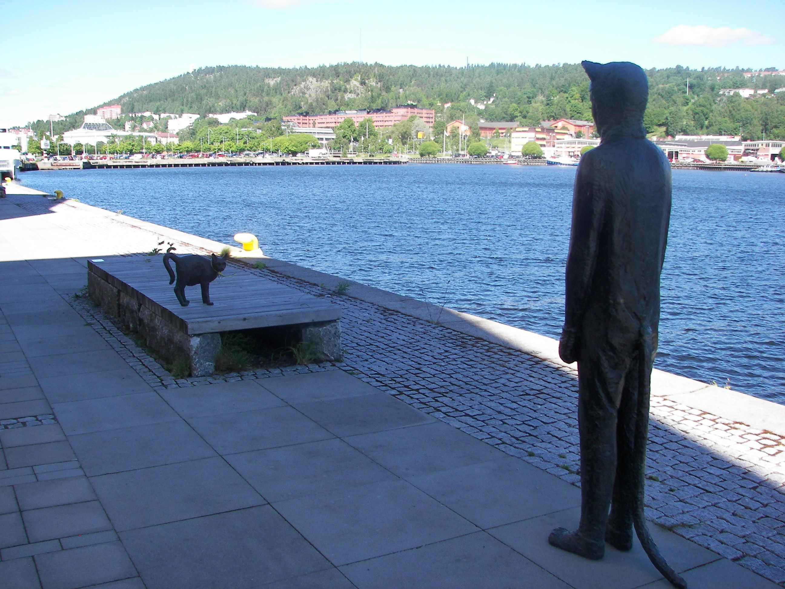 Skeenden av Linnéa Jörpeland i Inre hamnen, Sundsvall